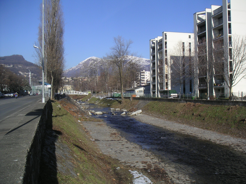 Fiume Cassarate